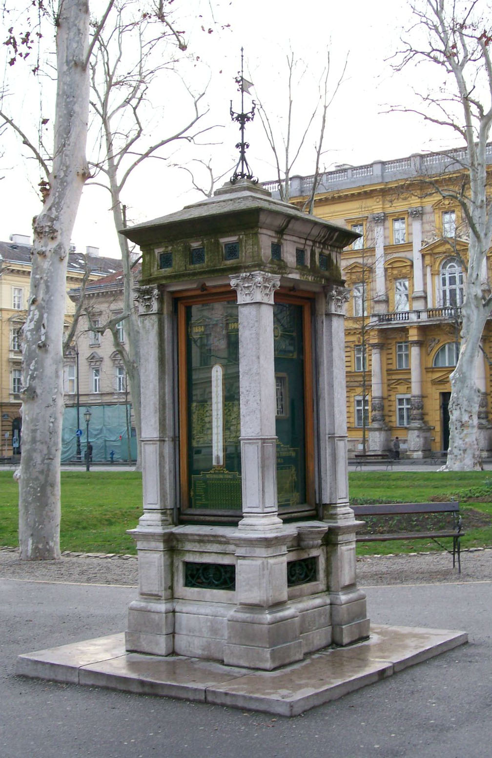 Meteorološki stup, Zrinjevac, Zagreb